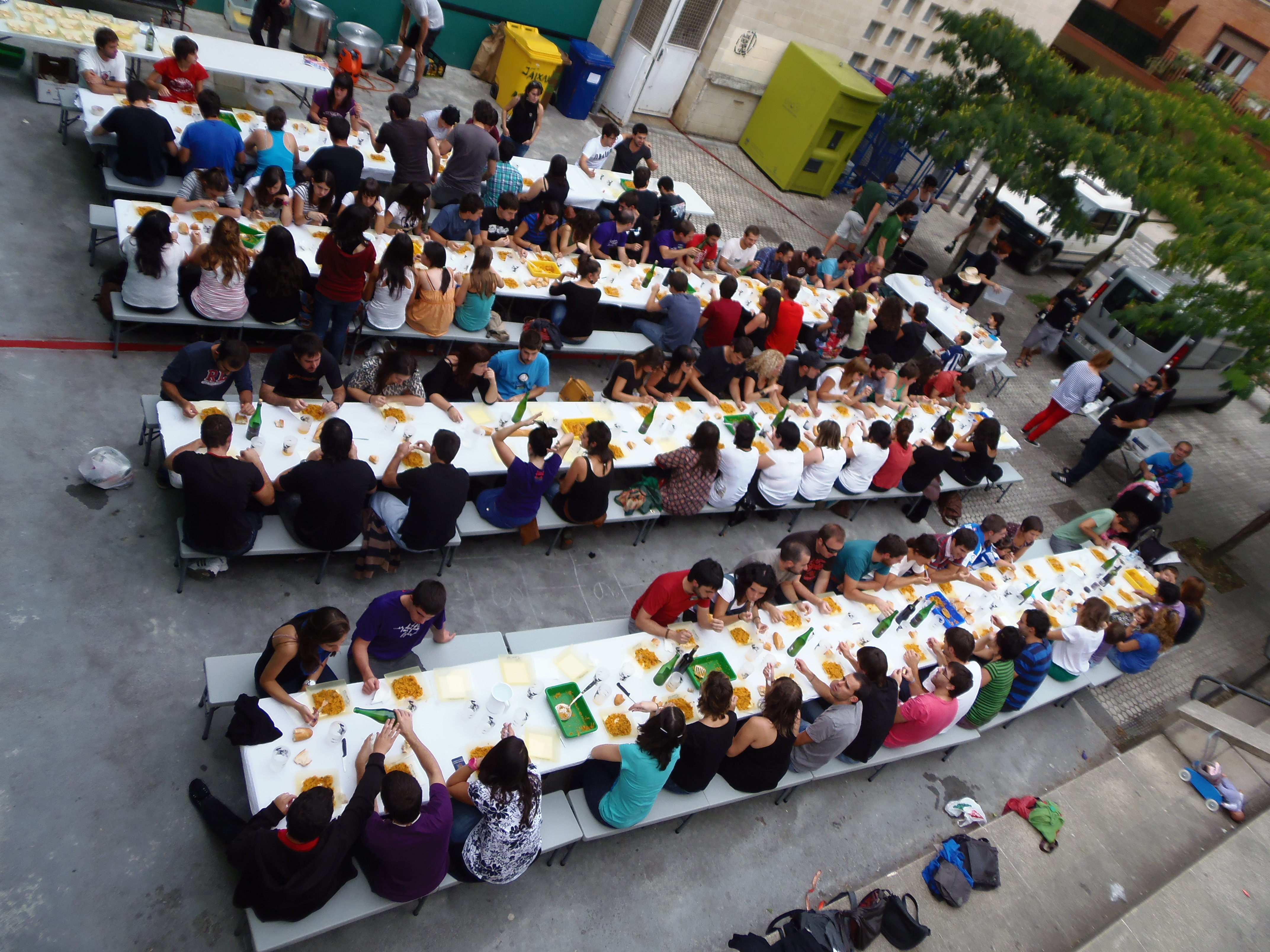 Antzuolako gaztetxea herri bazkaria, 2012ko Urriak 5. Gaztetxearen inagurazio egunean.